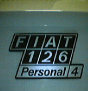 Camilla Giribardi ,scritta posteriore personal 4 , foto scattata da me